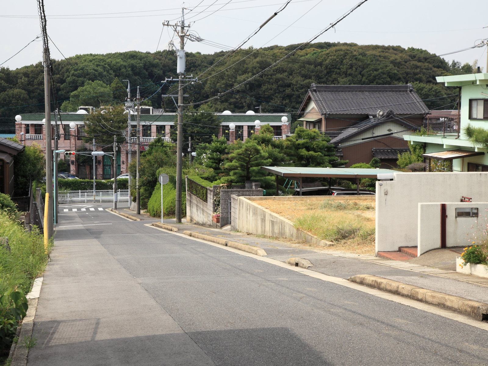 桶狭間セト山（名古屋市緑区、2012年）